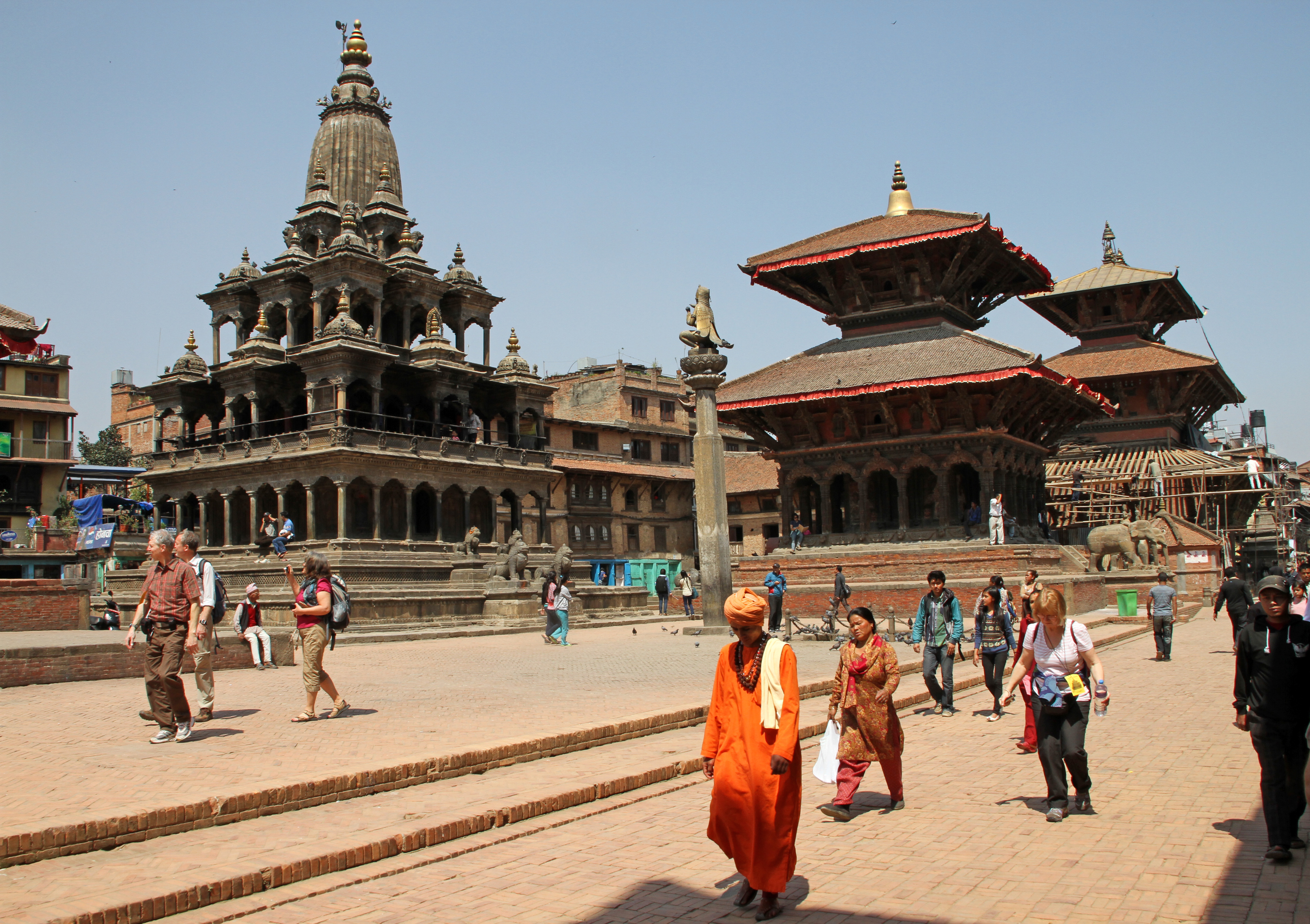 Patan, Krishna Mandir, Garudasäule, Vishveshvara, Bhimsen